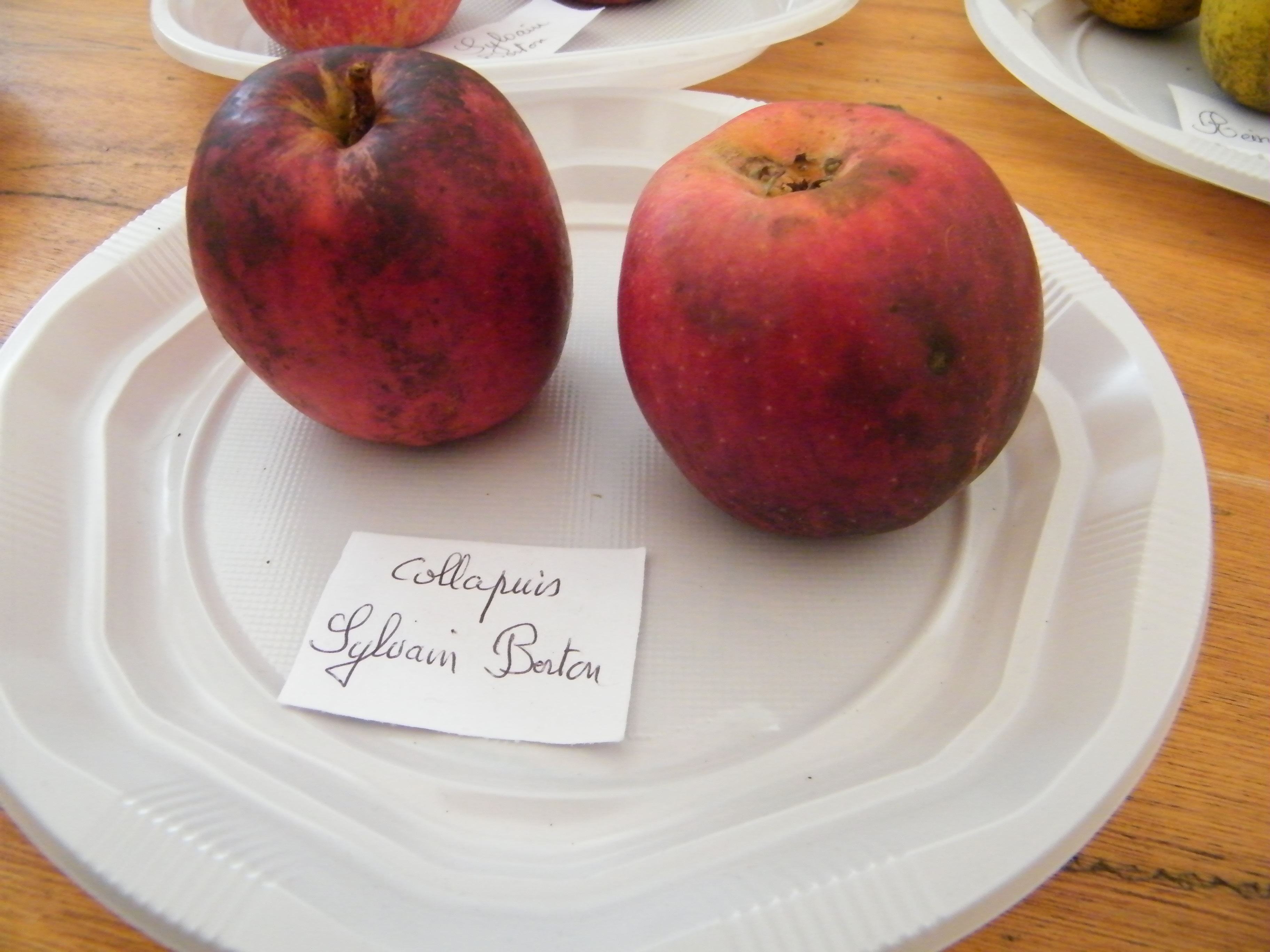 Colapuy, Mons-Boubert, Somme, Fr, expo du 29-10-2017 (88)